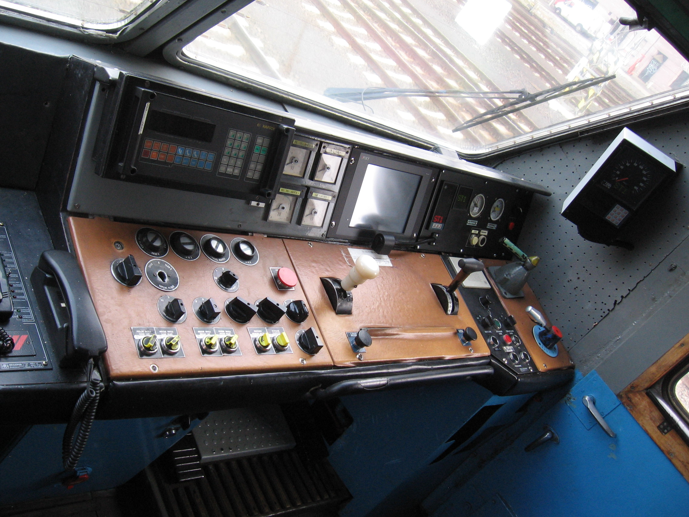 350.019 ZSSK